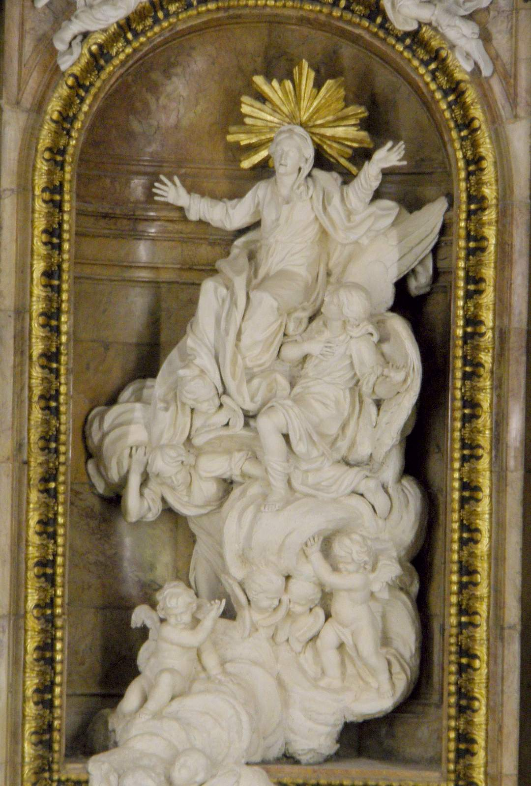 Iglesia de Nuestra Señora de la Asunción, Rentería (Gipuzkoa, País Vasco, España)